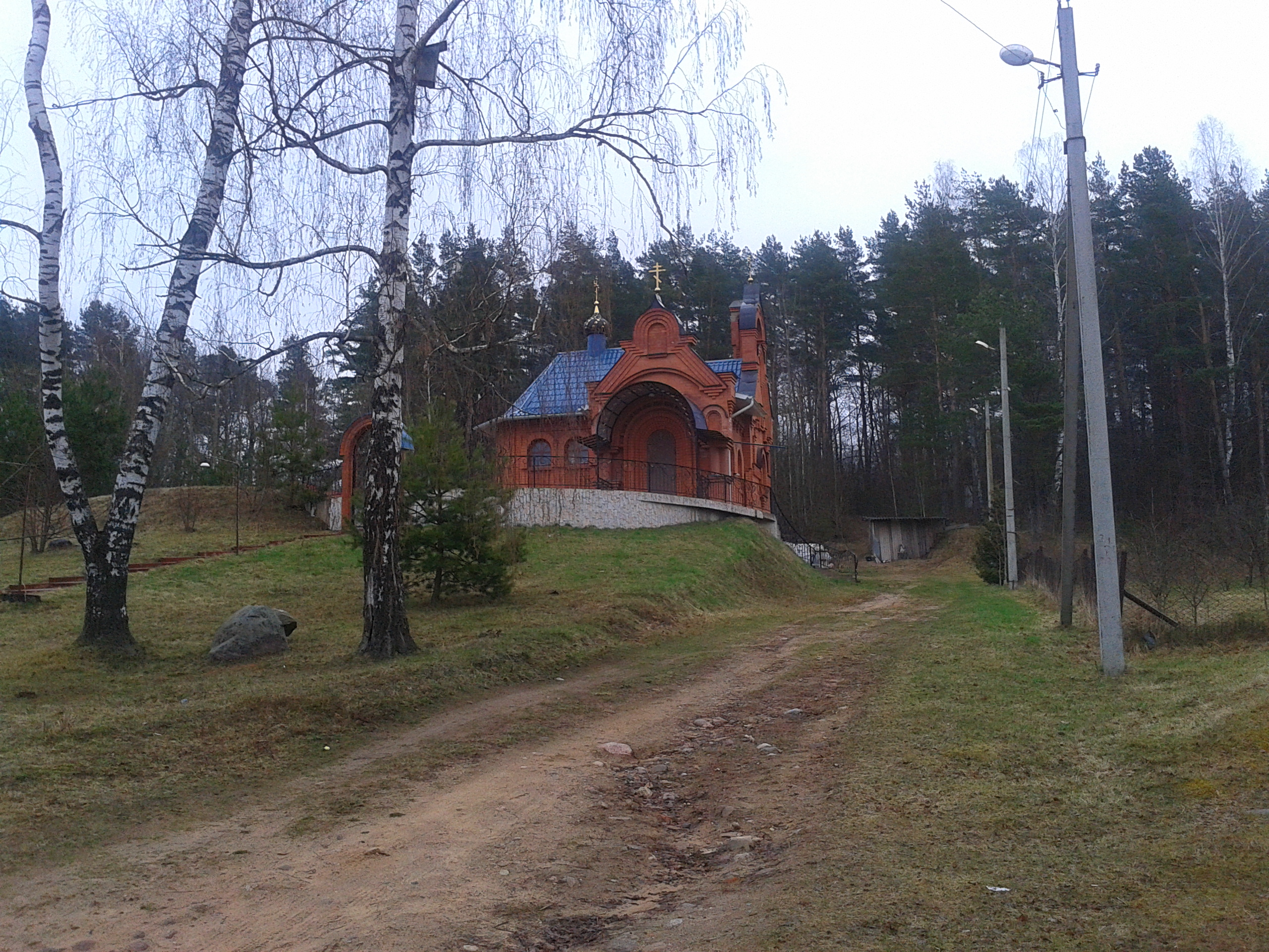 Церковь Успенская Божьей Матери